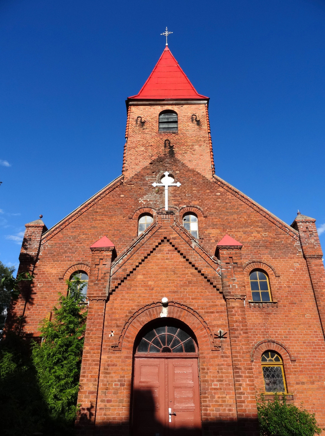 Kościół Matki Bożej Królowej Polski (1876) w Dąbrowie Wielkiej, gmina Nowa Wieś Wielka, powiat bydgoski